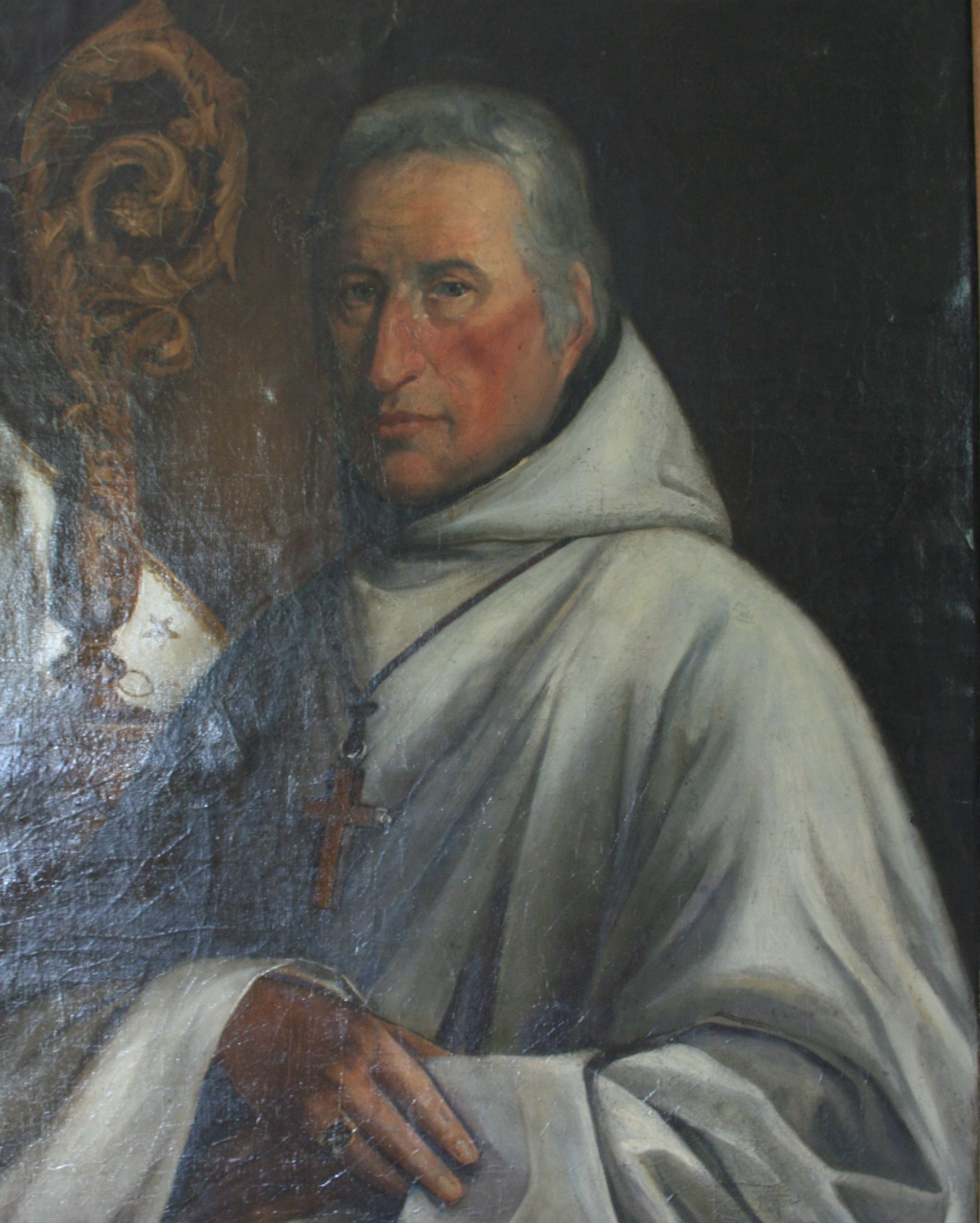 Tableau représentant Dom Augustin Onfroy, abbé de Notre-Dame-de-Grâce de Bricquebec.